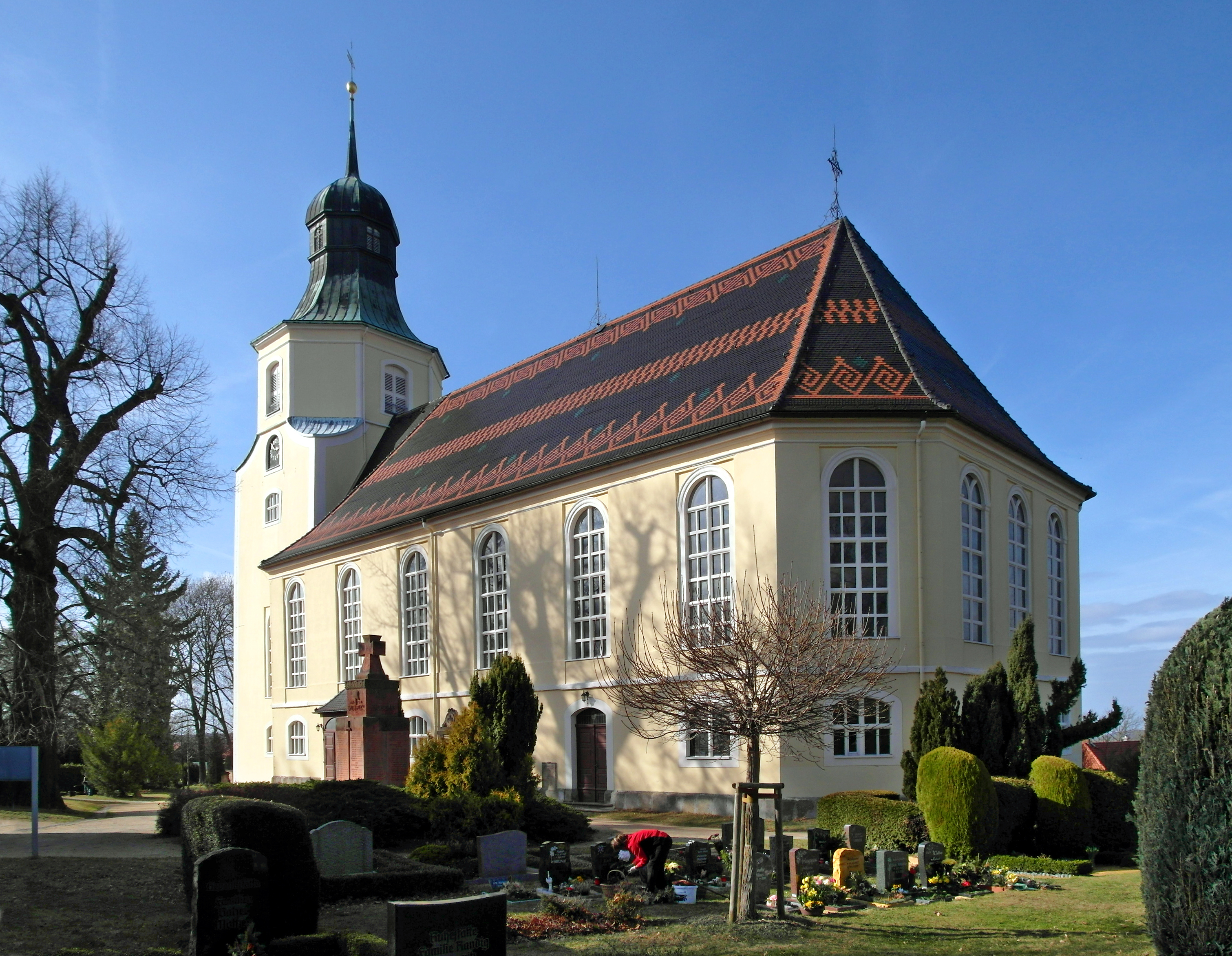 16.03.2017 02708 Kittlitz (Löbau), Alte Schulstraße: Kirche Kittlitz, heutiger Bau Mitte 18. Jh. [SAM8512.JPG]20170316450DR.JPG(c)Blobelt